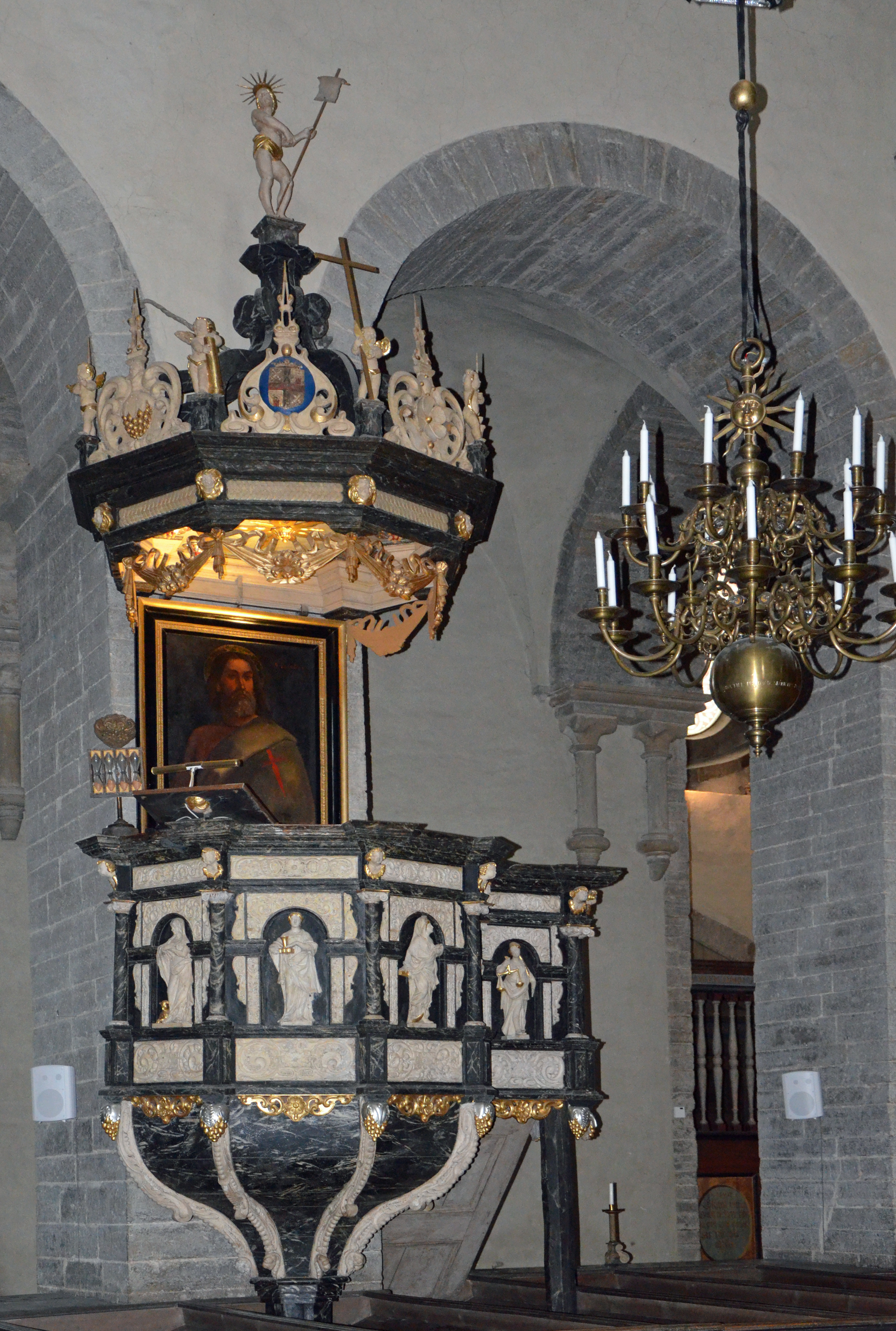 Klosterkirche Varnhem Kanzel